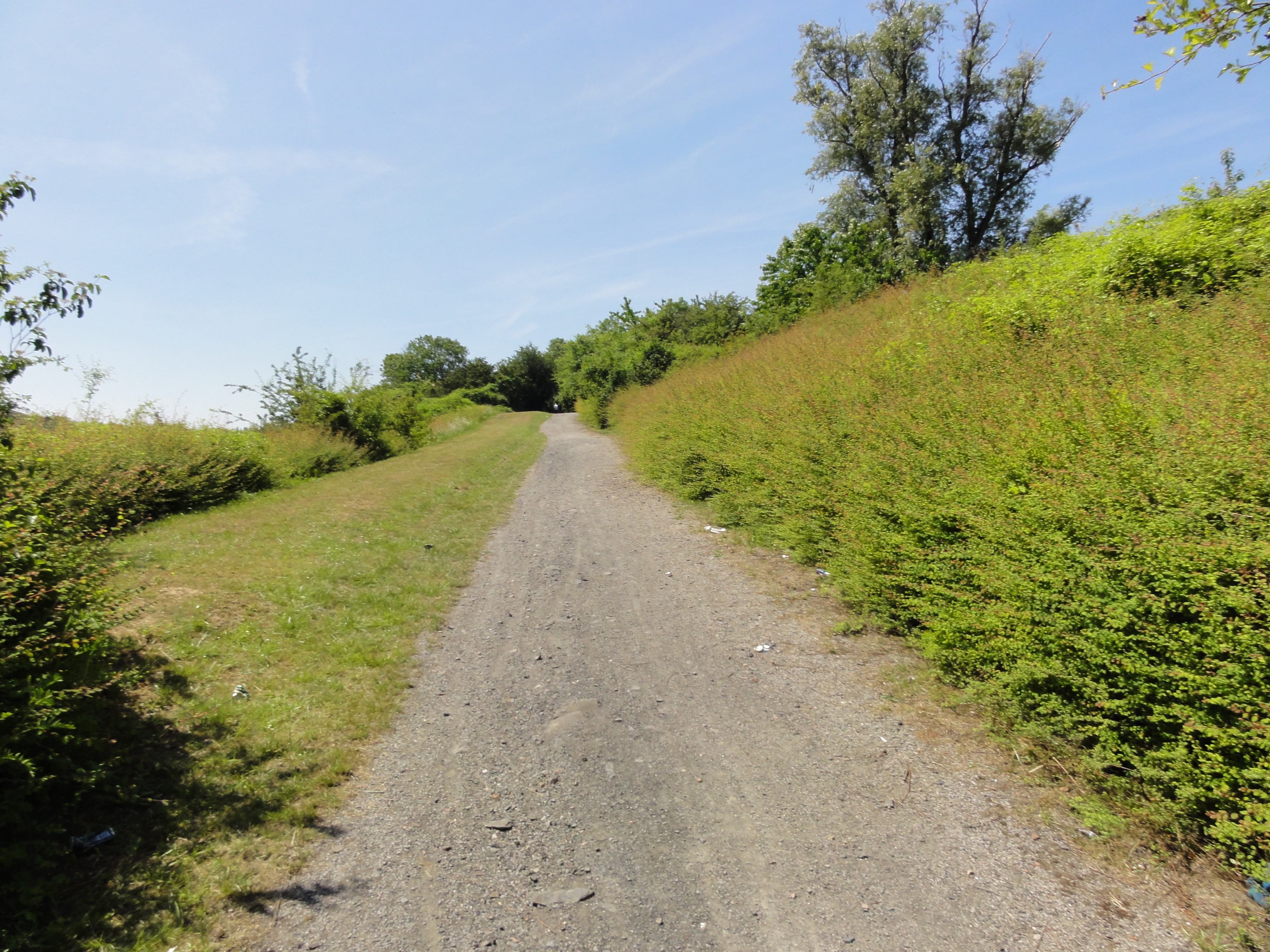 Terril n° 207 dit Cavalier d'Harnes, fosse n° 21 - 22 de la Compagnie des mines de Courrières dans le bassin minier du Nord-Pas-de-Calais, Harnes, Pas-de-Calais, Nord-Pas-de-Calais, France. Le terril no 207 est inscrit sur la liste du patrimoine mondial de l'Unesco le 30 juin 2012 et y constitue en partie le site no 51.